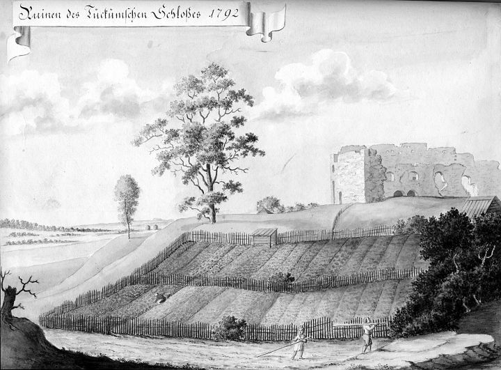 Tukumsi ordulinnuse varemed idakagust 1792 a. J. C. Brotze kogu.